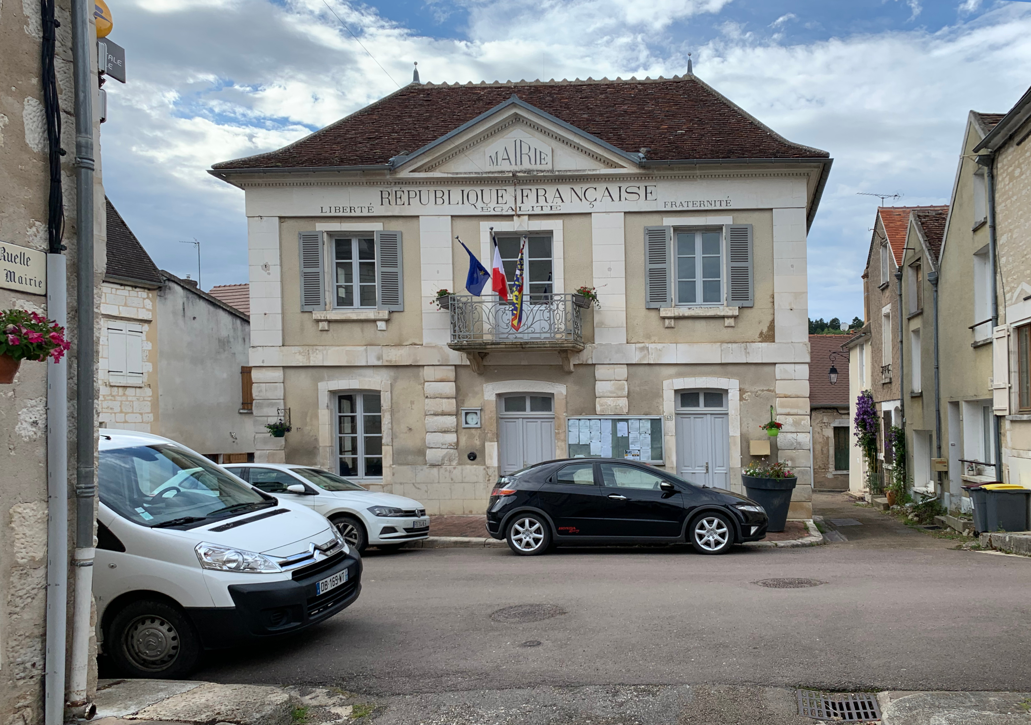 Mairie d'Irancy (Yonne).